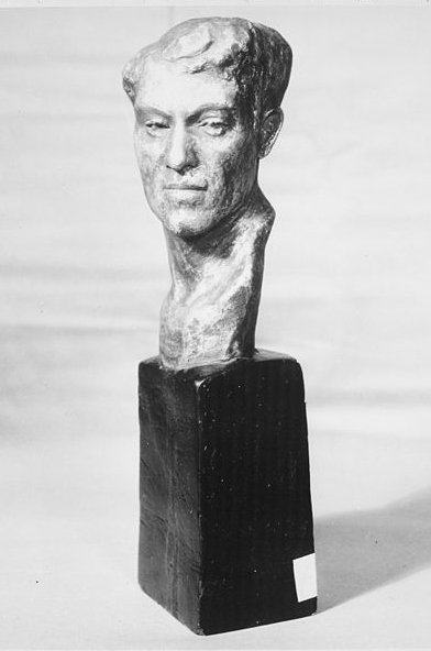 General notes: Sculpture.